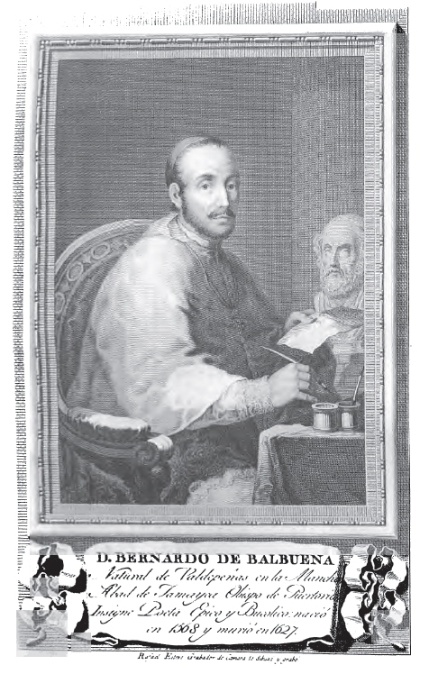 Retrato de Bernardo de Balbuena.